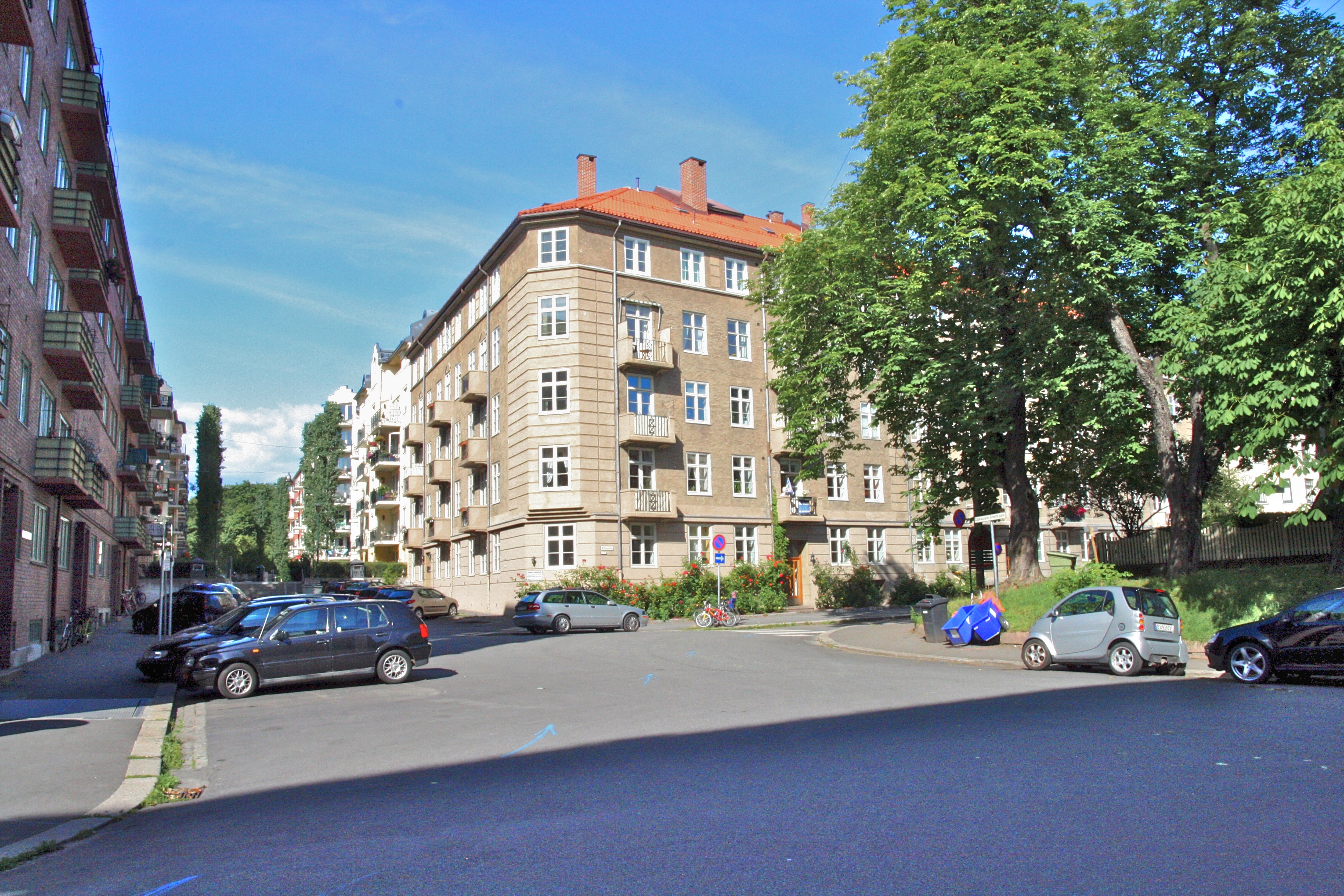 Zahlkasserer Schafts plass på Frogner i Oslo.